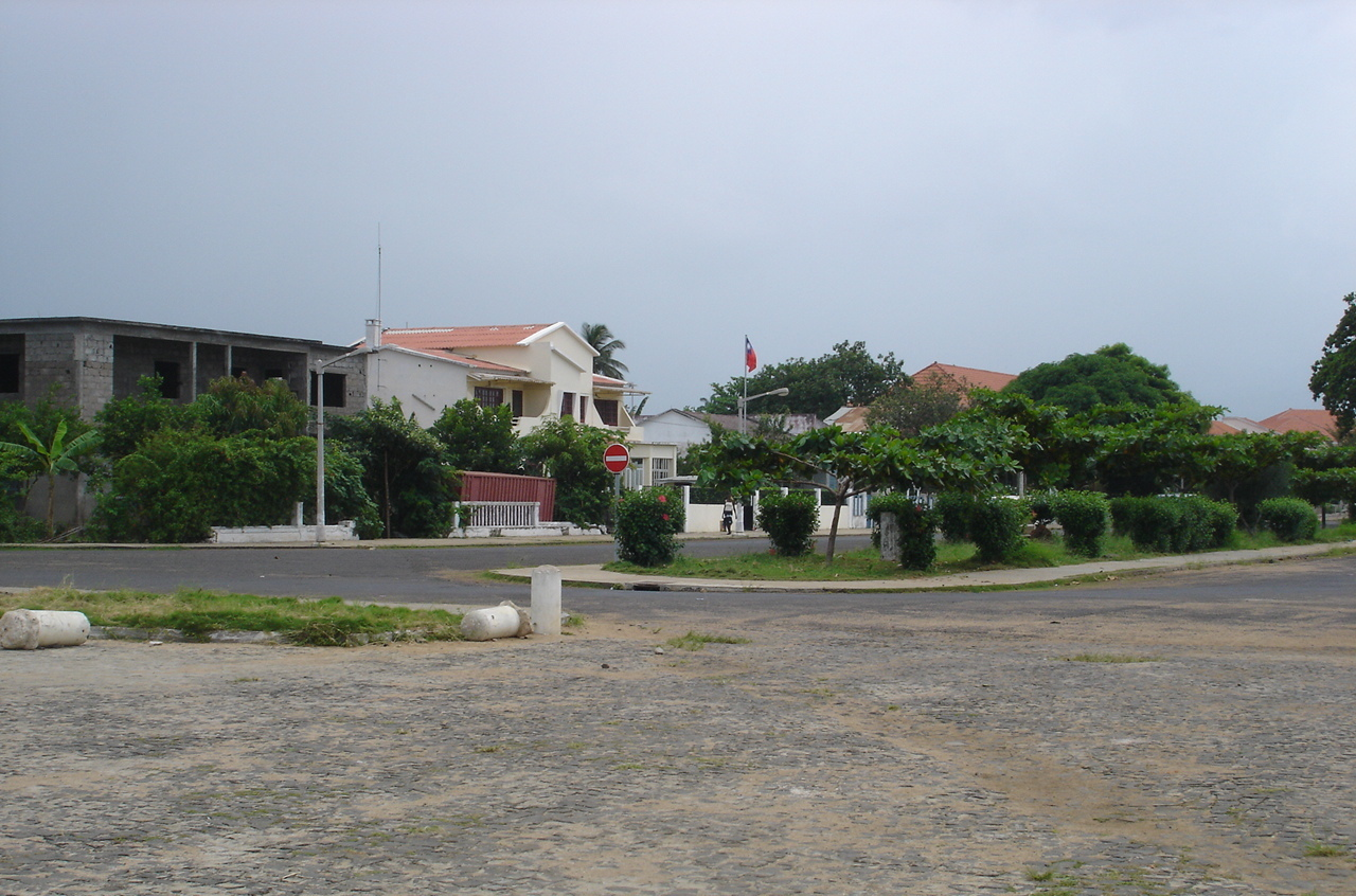 Embaixada de Taiwan em São Tomé